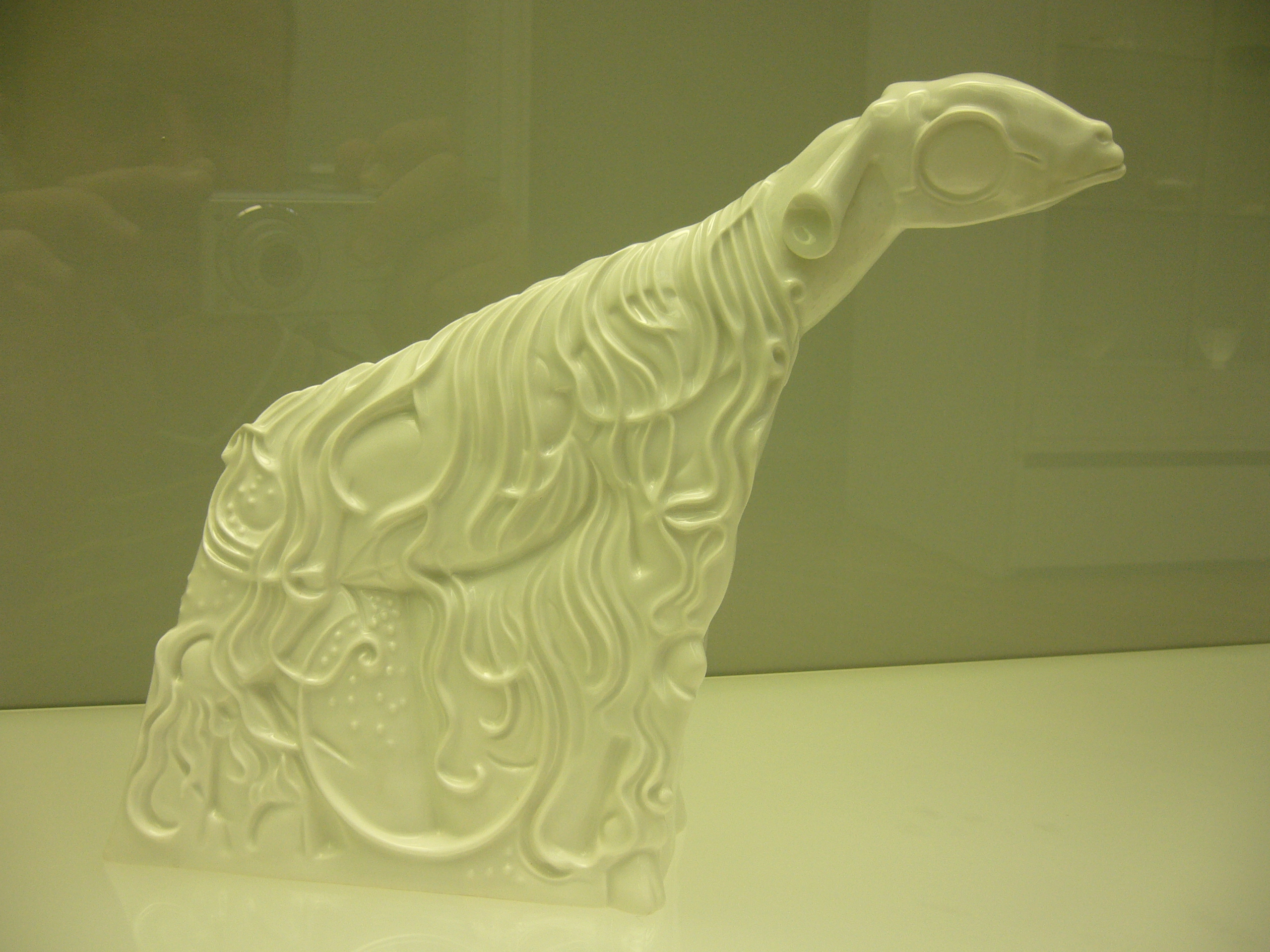 BErlingo museo bateko ahari irudia